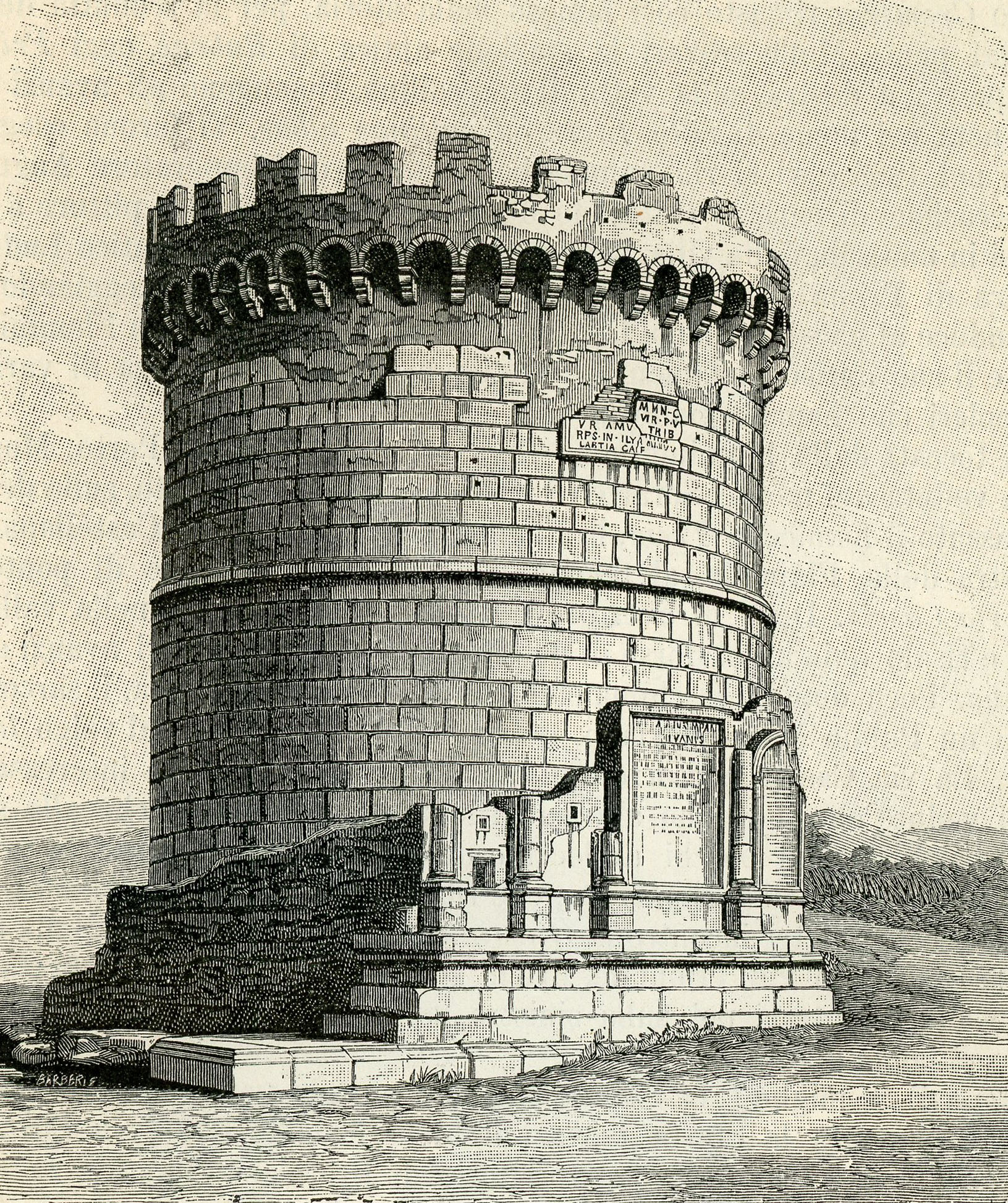 Roma: Mausoleo di Plauzio Lucano (xilografia).